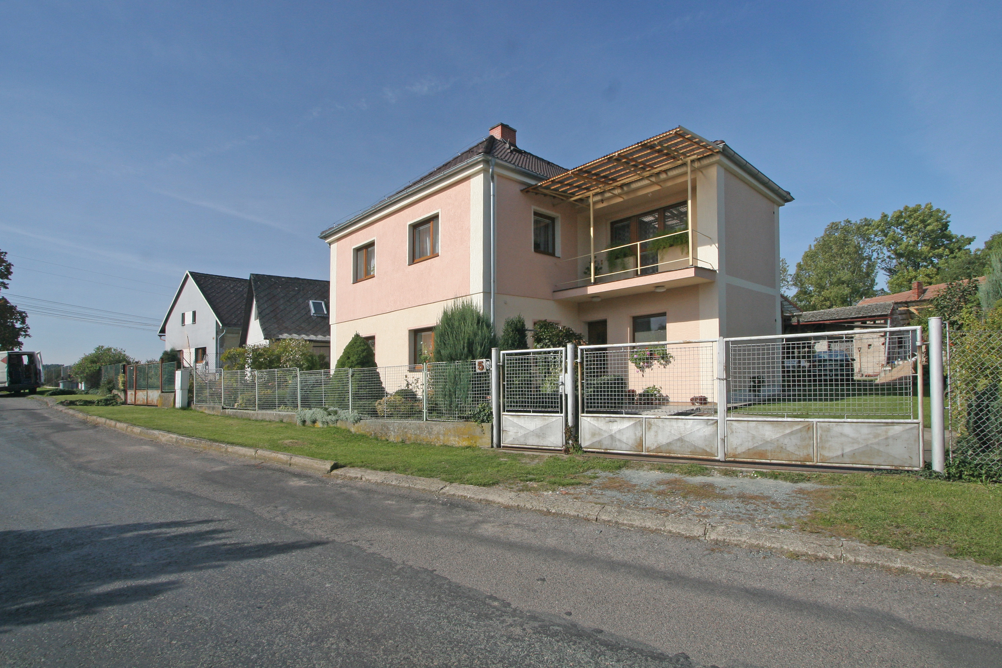 Loděnice čp. 5